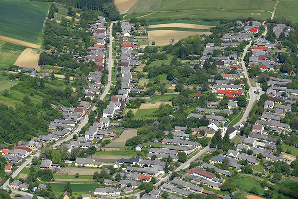 Jásd község a magasból